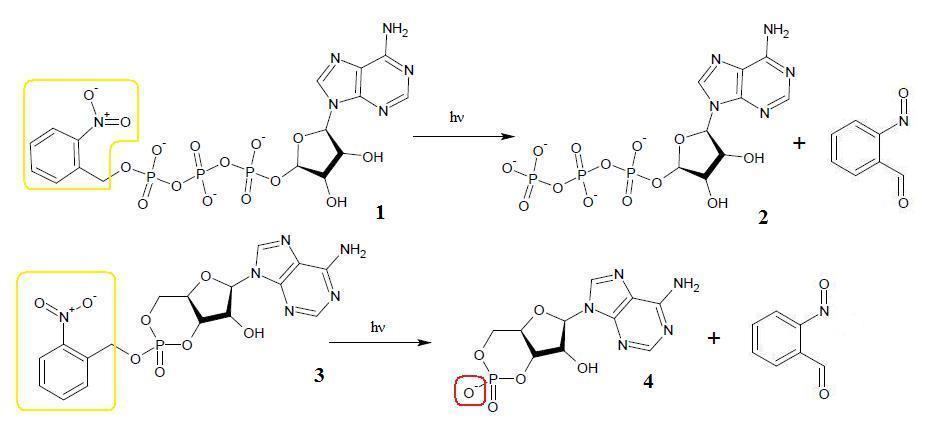 caged ATP